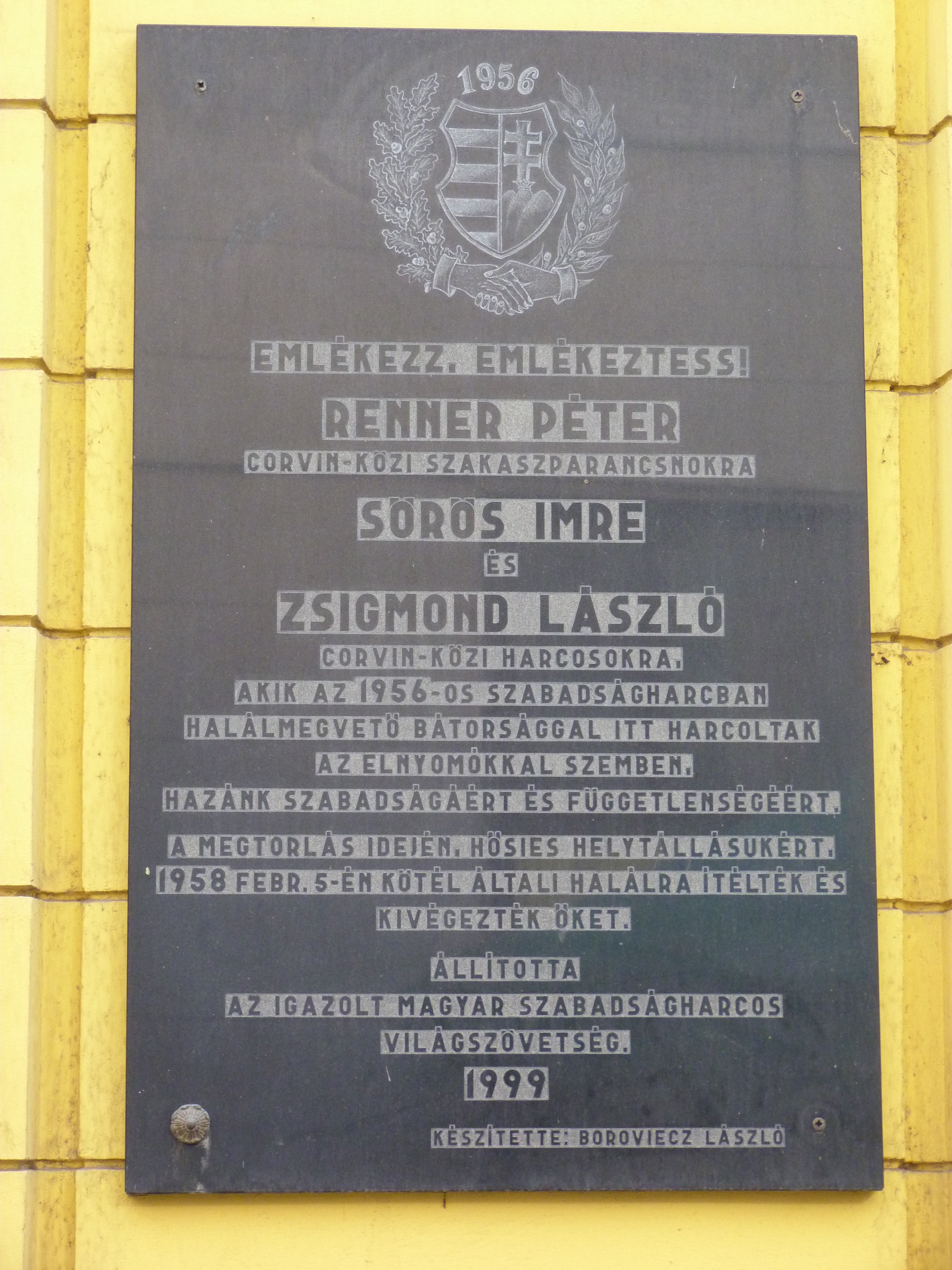 A felvétel 2012. december 5 -én készült Budapesten, a Józsefvárosban. Corvin köz. ©© Published under Creative Commons in the Metapolisz DVD line. All of the photos and vids in the Metapolisz DVD line are under Creative Commons and can be used even for commercial – for profit – purposes. Recommended Citation Derzsi Elekes Andor: Metapolisz DVD line ©© Megjelent Creative Commons alatt a Metapolisz sorozatban. A Metapolisz sorozat valamennyi képe és filmje Creative Commons alatti valamint kereskedelmi - for profit - célra is felhasználható. Ajánlott hivatkozás: Derzsi Elekes Andor: Metapolisz DVD line . Ugyanerről a tábláról másik fénykép: File:Budapest-corvin-renner.jpg.